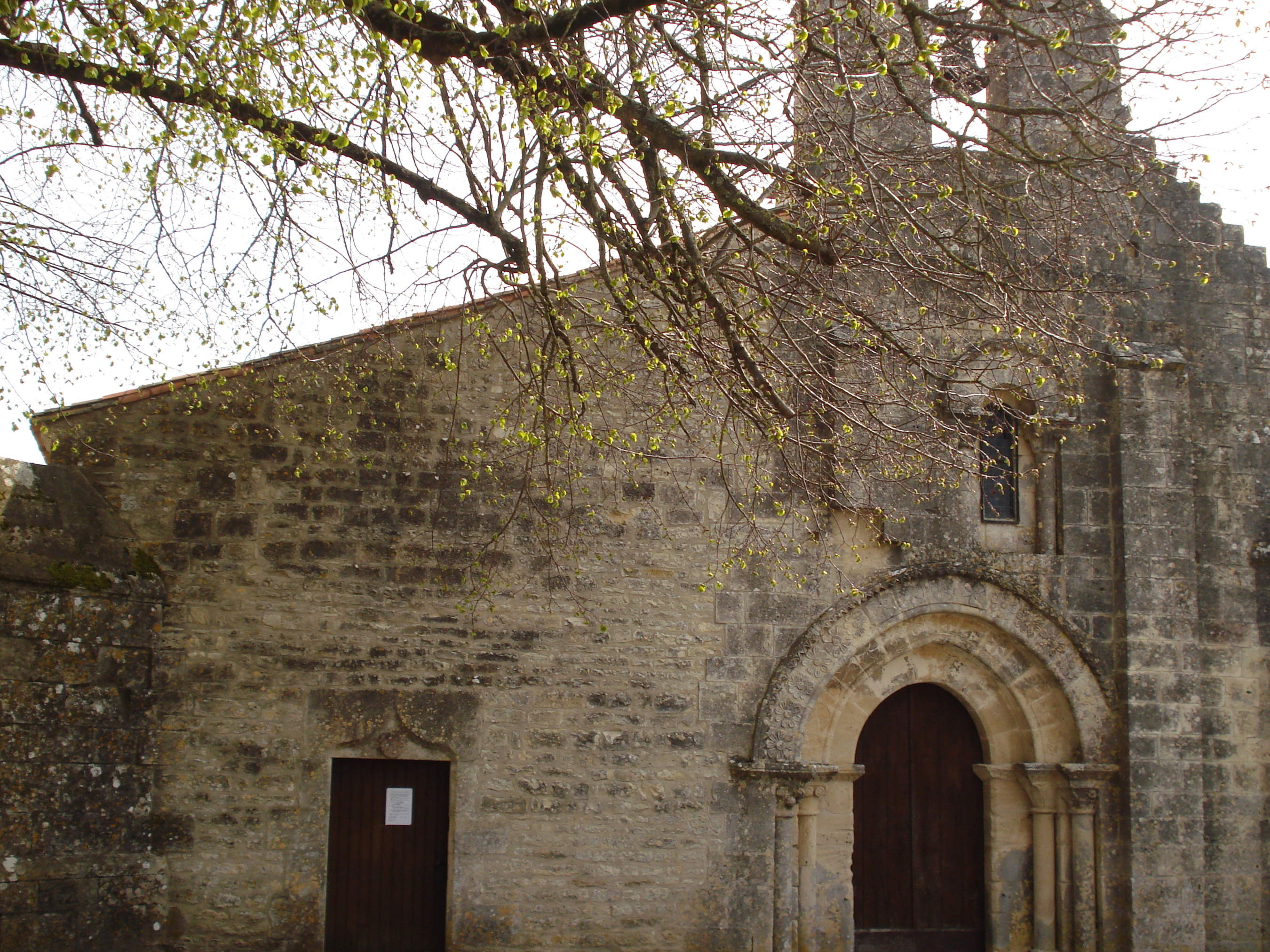 L'église de Villiers-Couture